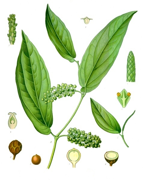 Kubeben-Pfeffer. A männlicher Blüthenzweig, natürl. Grösse; B Fruchtzweig, desgl.; 1 oberer Theil der männlichen Blüthenähre, vergrössert; 2 männliche Blüthe mit Deckblatt, desgl.; 3 Theil der Fruchtähre, desgl.; 4 Fruchtknoten im Längsschnitt, desgl.; 5 Frucht, desgl.; 6, 7 dieselbe im Quer- und Längsschnitt, desgl.; 8 Same, desgl.; 9 Scheitel des Samens mit dem Embryo.